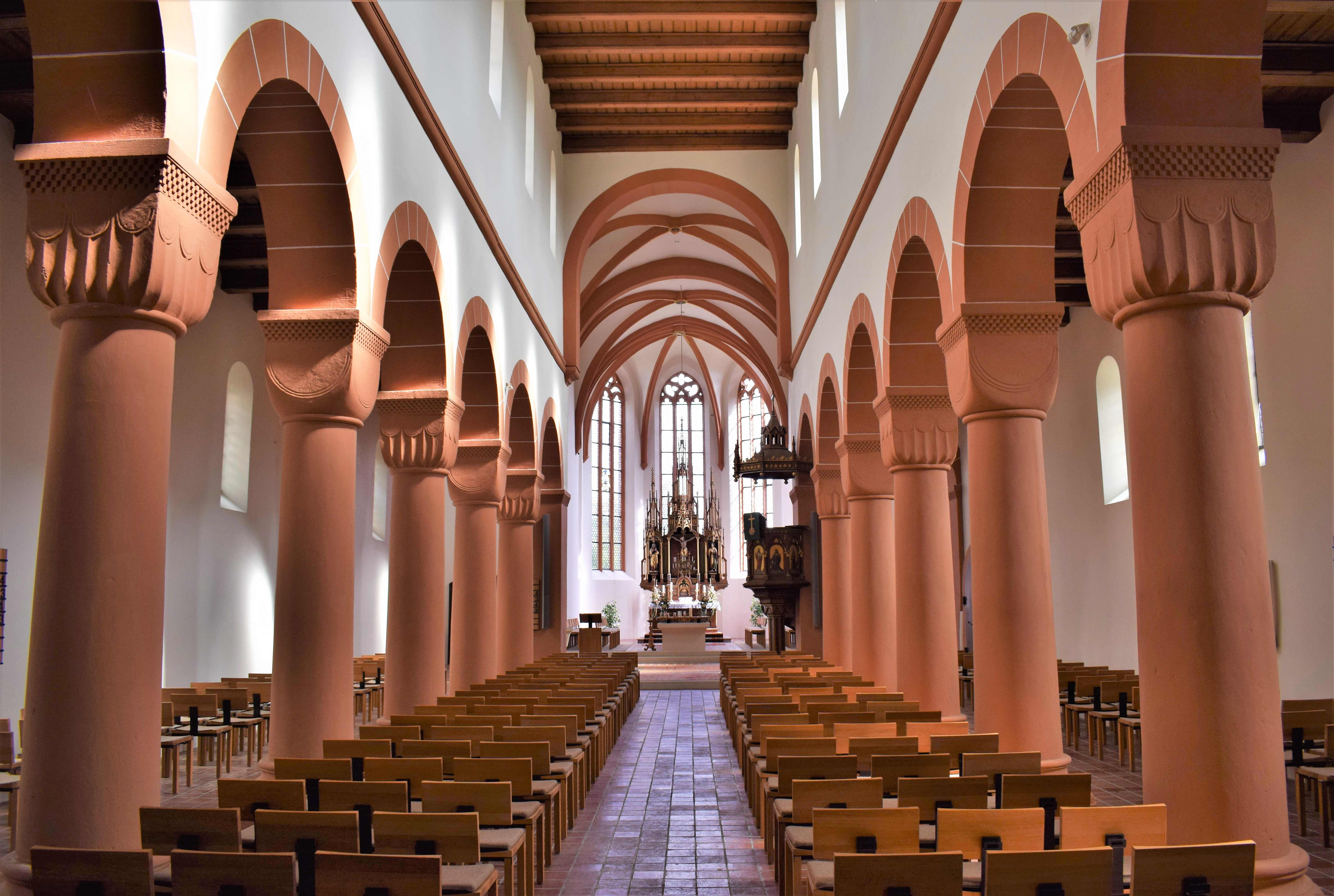 Klosterkirche Münchaurach (2017)